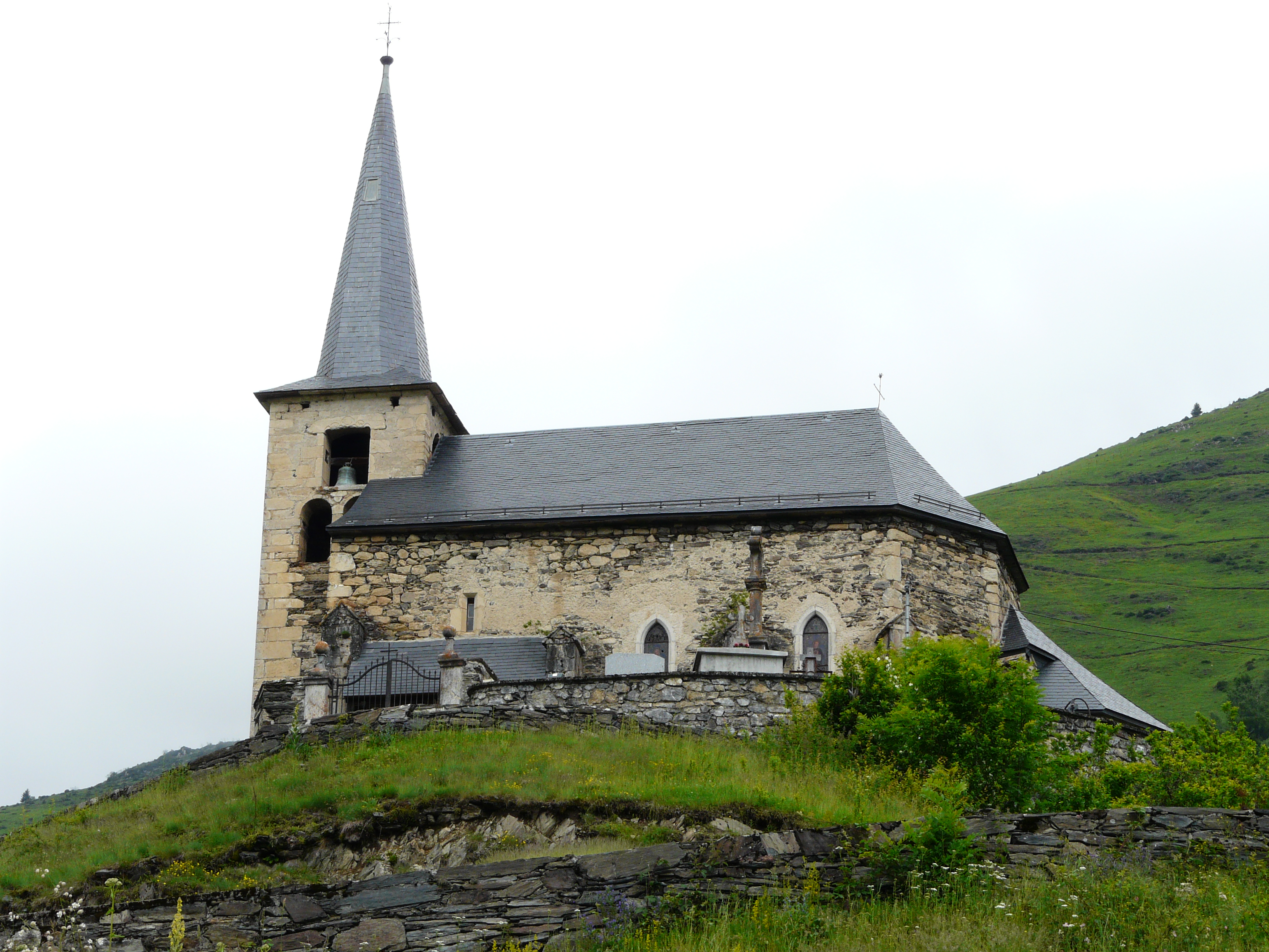 Le côté sud de l'église Nativité-de-la-Sainte-Vierge, Cirès, Haute-Garonne, France.